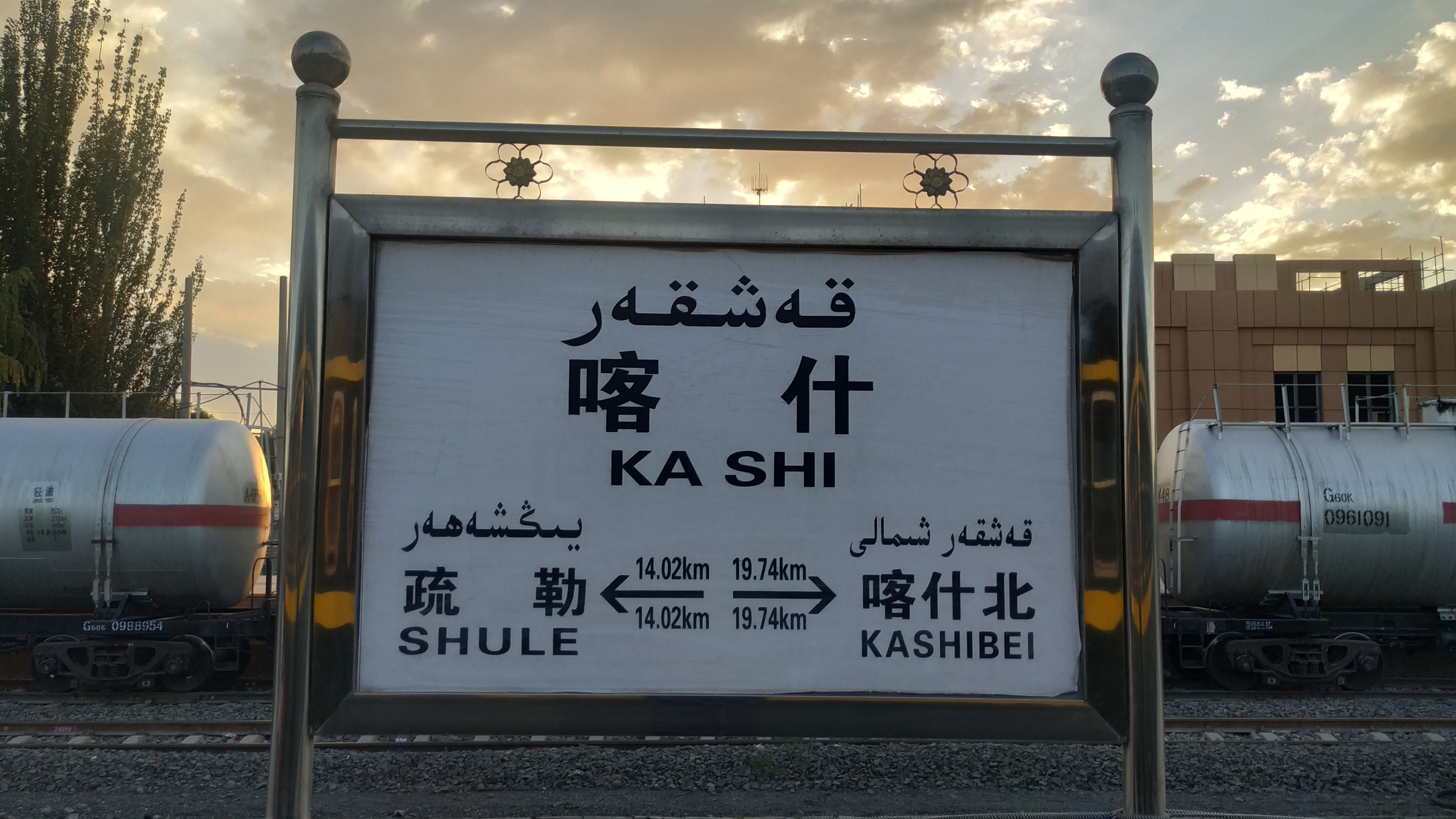 中文（中国大陆）: 喀什站站牌